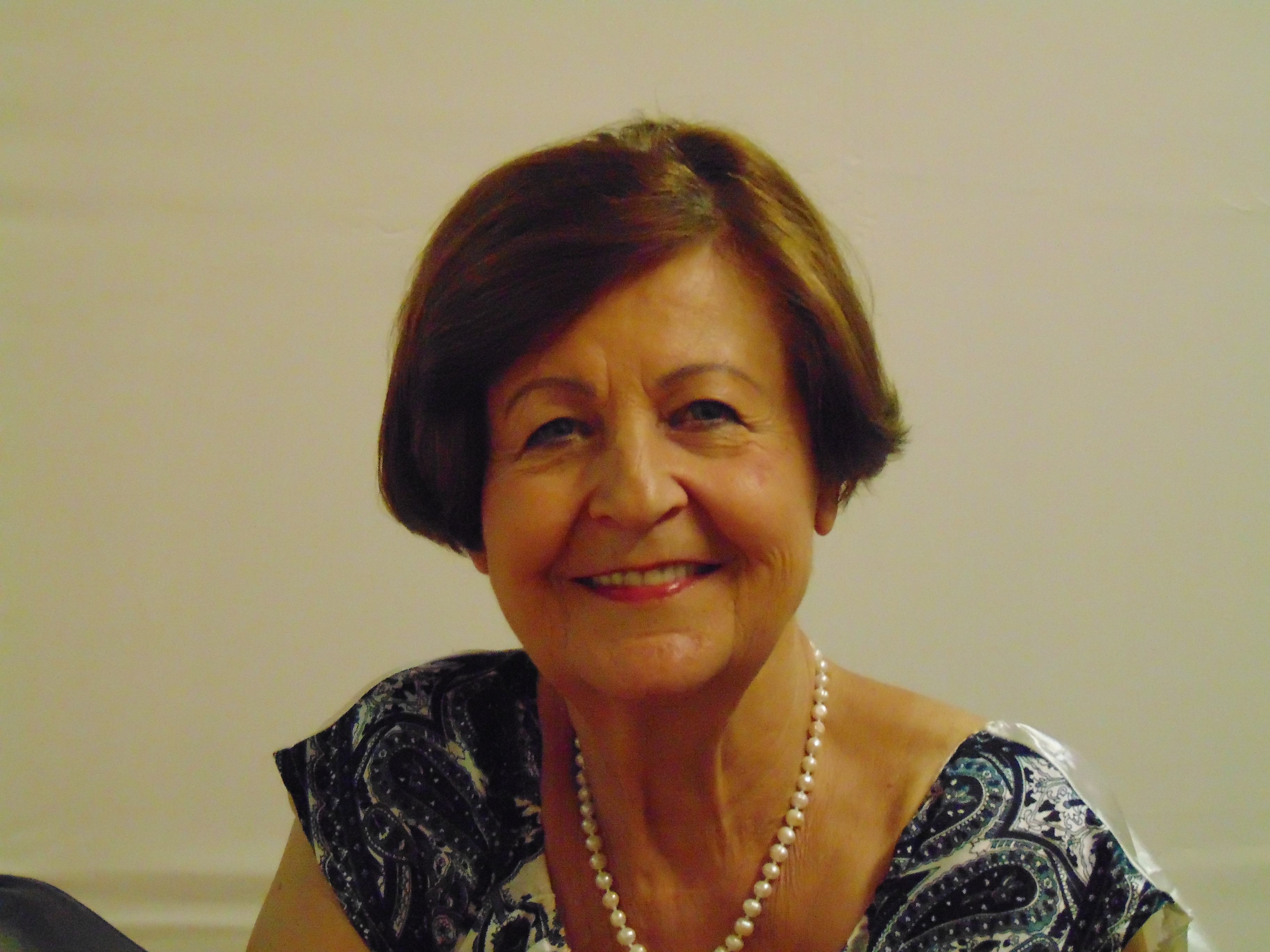 Prof. Dr. Bagdy Emőke